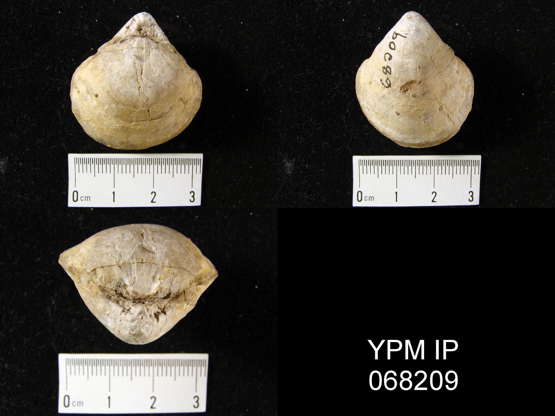 Stringocephalus burtini; YPM IP 068209; Europa; Deutschland; Rheinland-Pfalz; Vulkaneifel; Eifel Region in Dorsal (links oben) Ventral (rechts oben) Posterior (links unten) Zur Verfügung gestellt unter von Yale Peabody Museum of Natural History [1] Division of Invertebrate Paleontology, Yale University